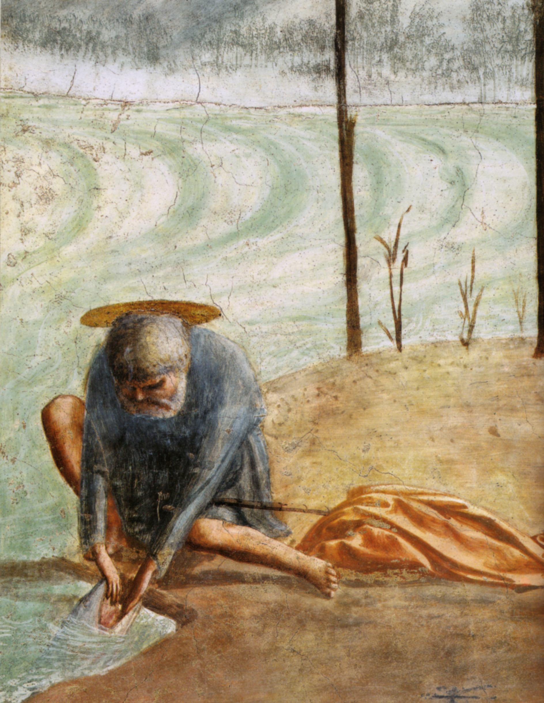 detail 2, (restaurato)